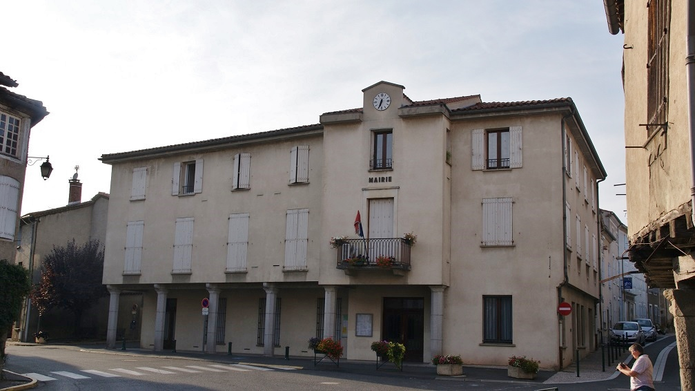 la Mairie